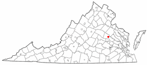 va maps